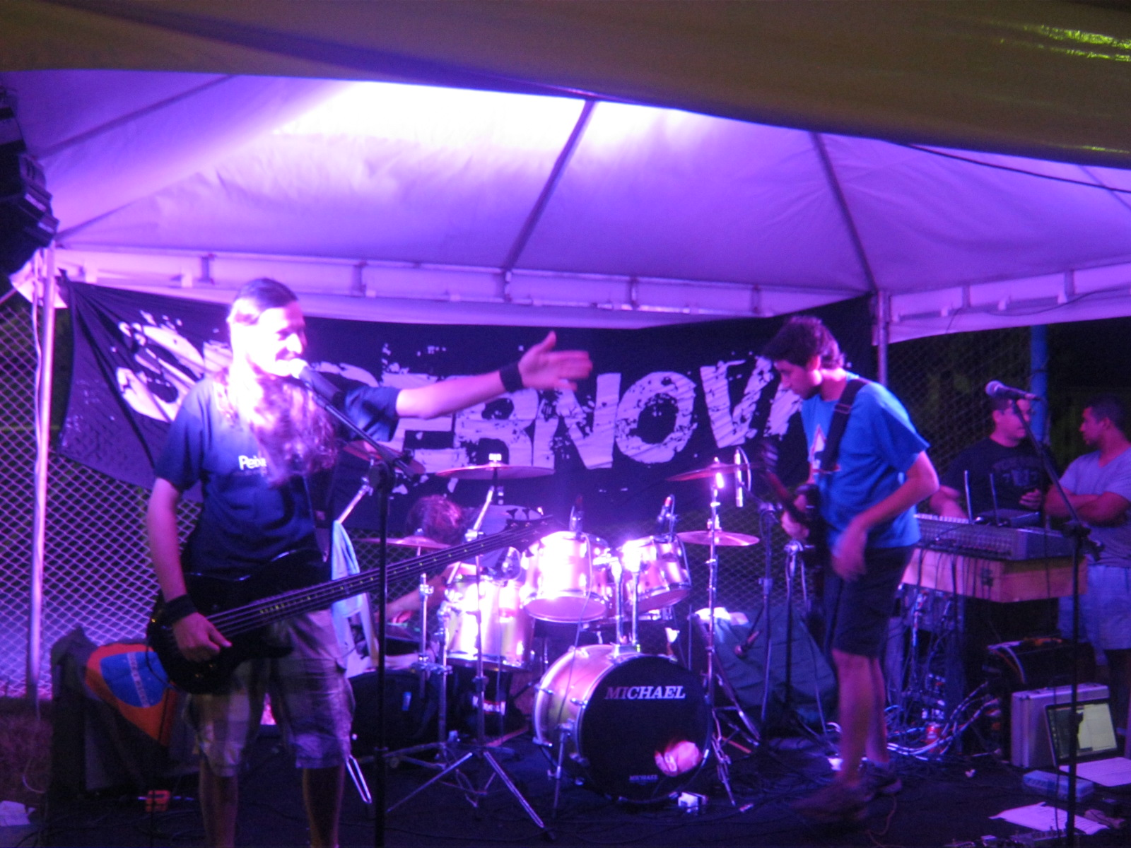 Konzerto de Supernova dum la IJK 2014